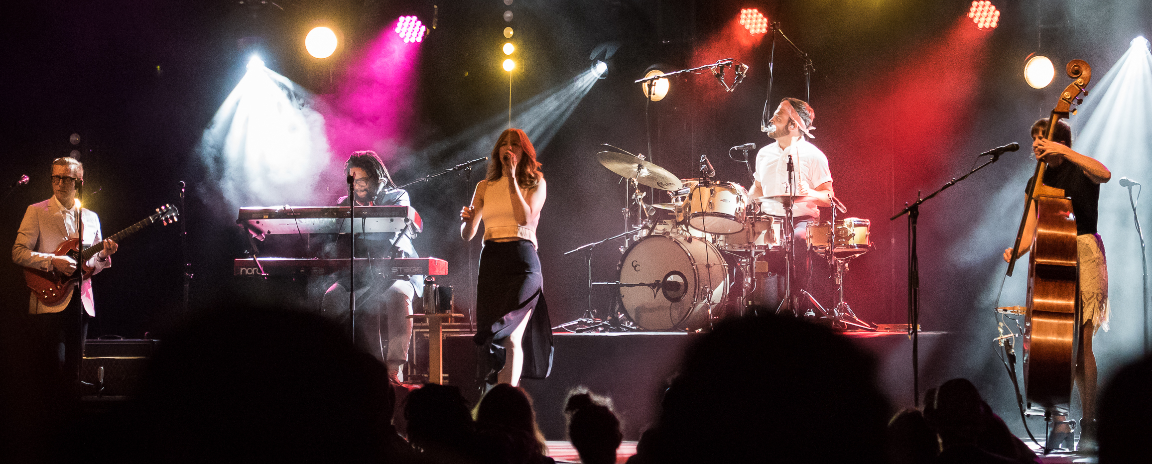 Lake Street Dive @ BRIC Celebrate Brooklyn! Festival - June 7, 2017 Prospect Park Bandshell Brooklyn, NY